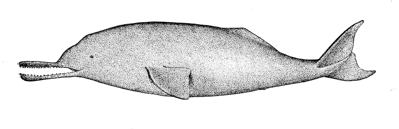 Platanista gangetica